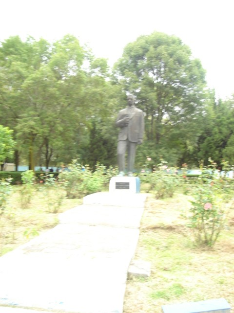 Estatua del Profesor Rafael Ramirez, misionero Rural